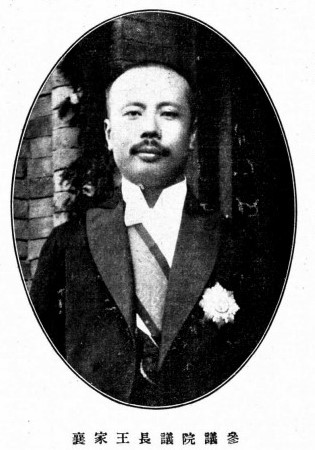 中文（台灣）: 參議院議長王家襄